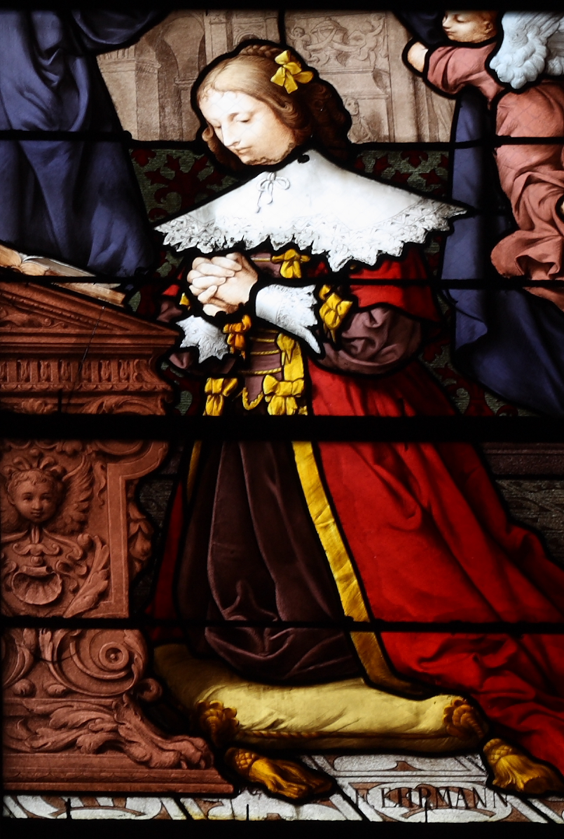 Bleiglasfenster (Ausschnitt) Nr. 18 (19. Jahrhundert) in der katholischen Pfarrkirche Saint-Martin (Collégiale Saint-Martin) in Montmorency, Darstellung: Marie-Félicie des Ursins Signatur : "F. EHRMANN" (siehe: Dominique Foussard, Charles Huet, Mathieu Lours: Églises du Val-d'Oise. Pays de France, Vallée de Montmorency, Société d'Histoire et d'Archéologie de Gonesse et du Pays de France, 2. Auflage, Gonesse 2011, ISBN 9782953155426)